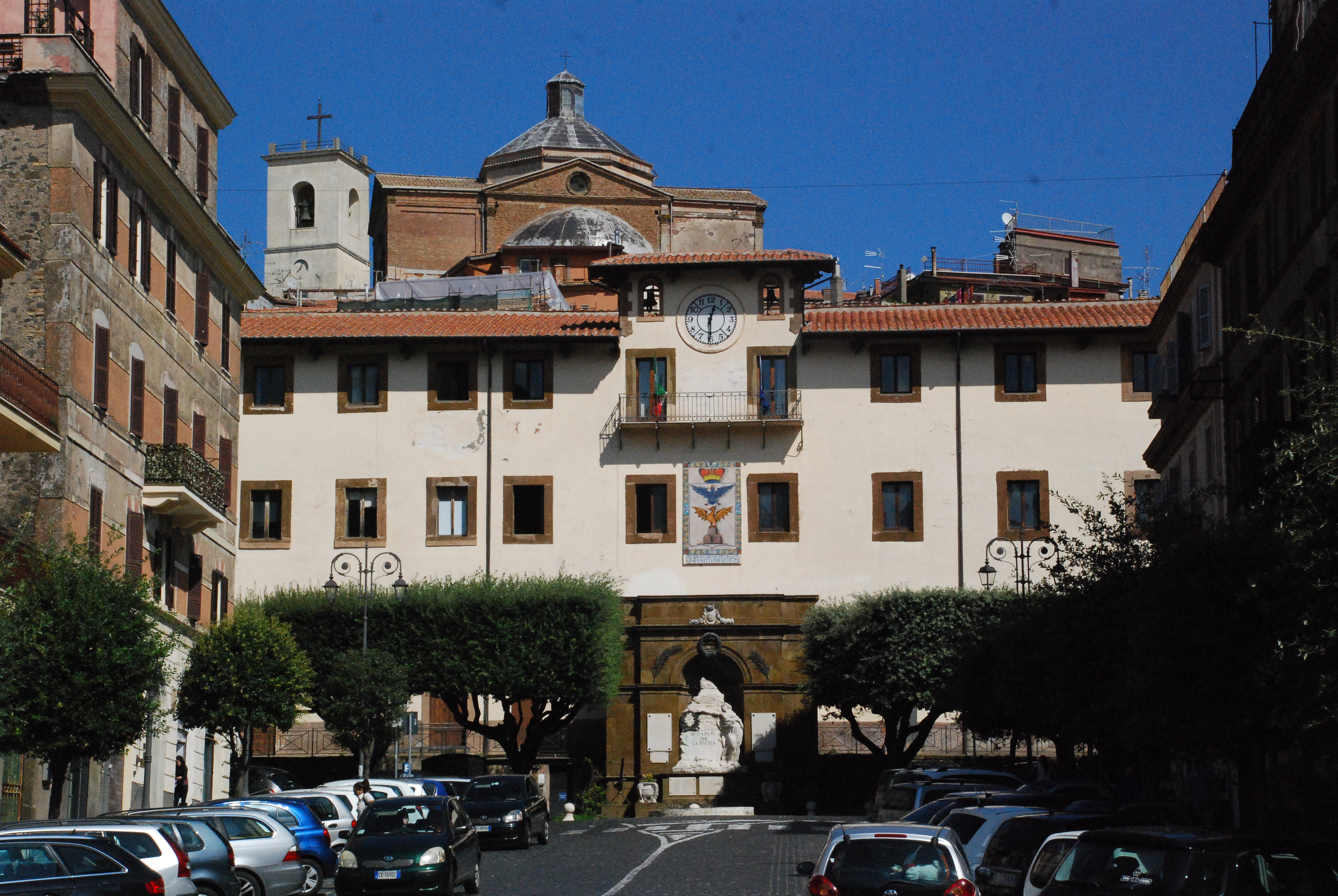 Palazzo Borghese This is a photo of a monument which is part of cultural heritage of Italy.